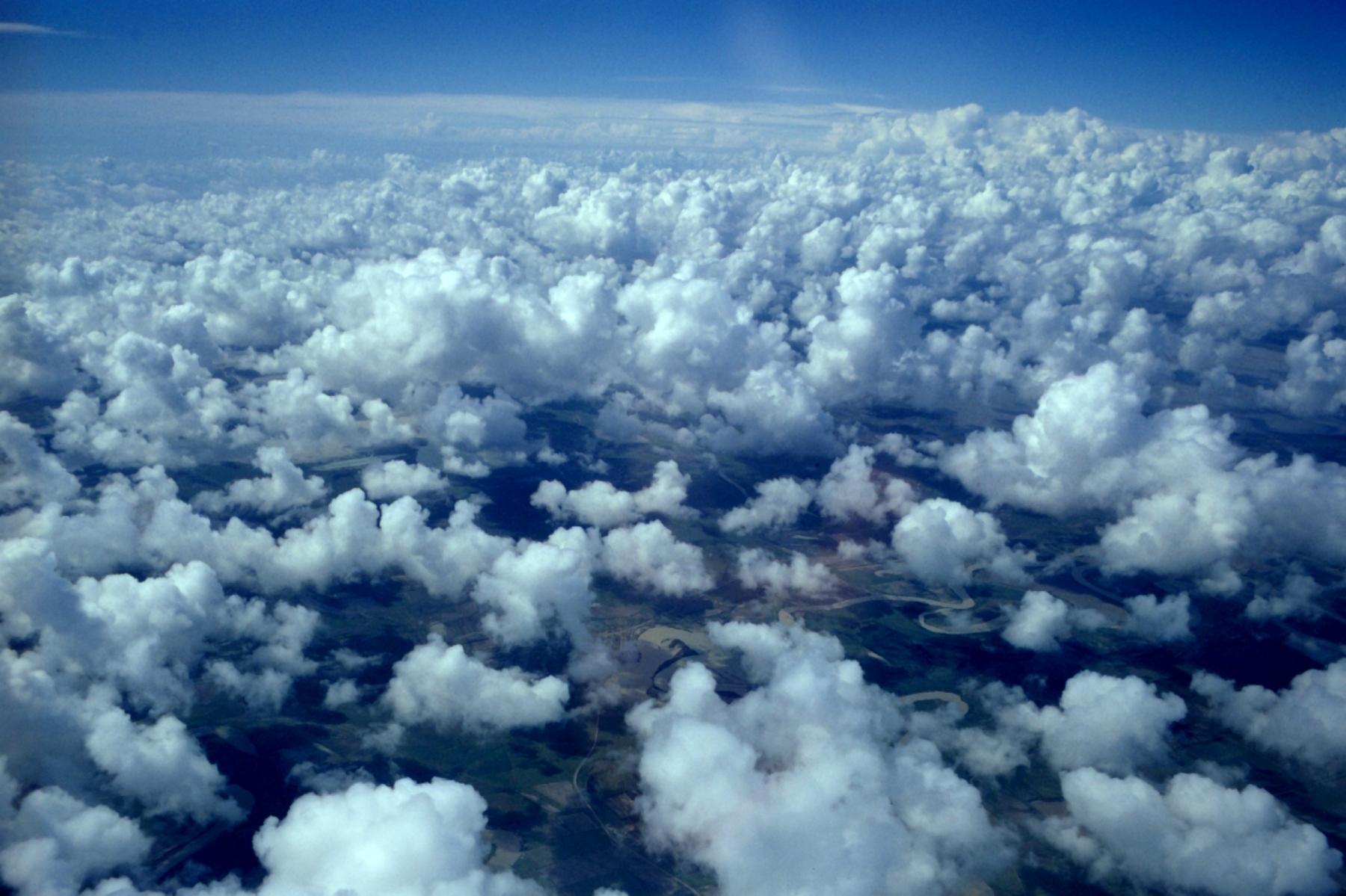 fly00803